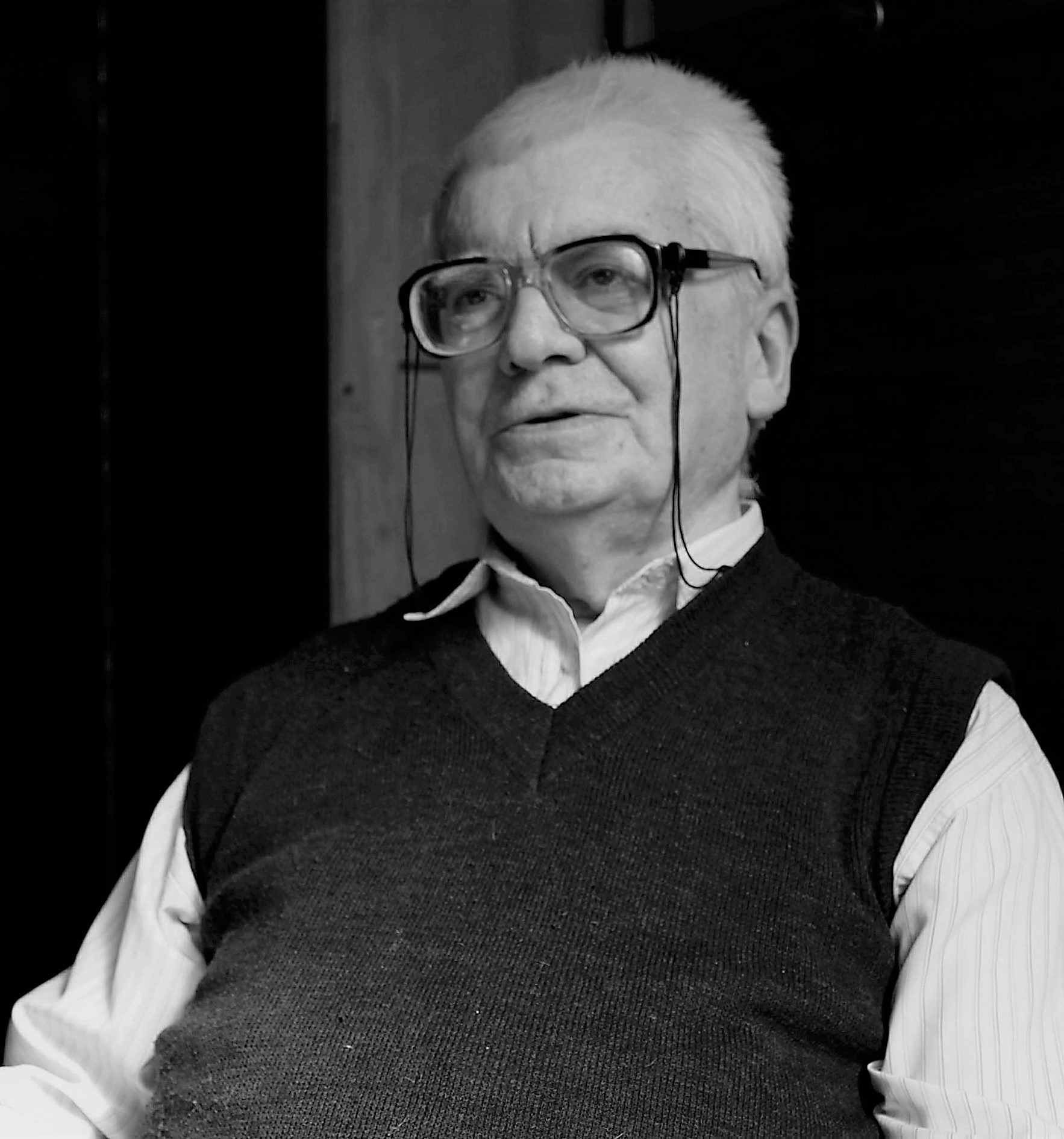 მიხეილ ნანაეიშვილი